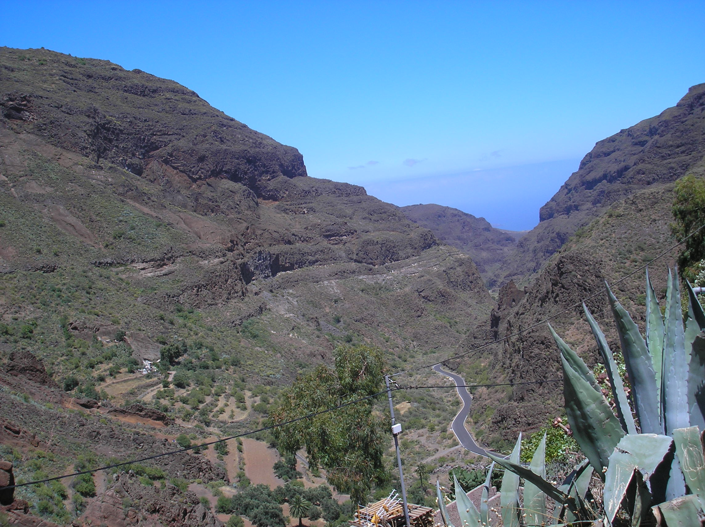 Barranco Guayadeque en dirección a la costa